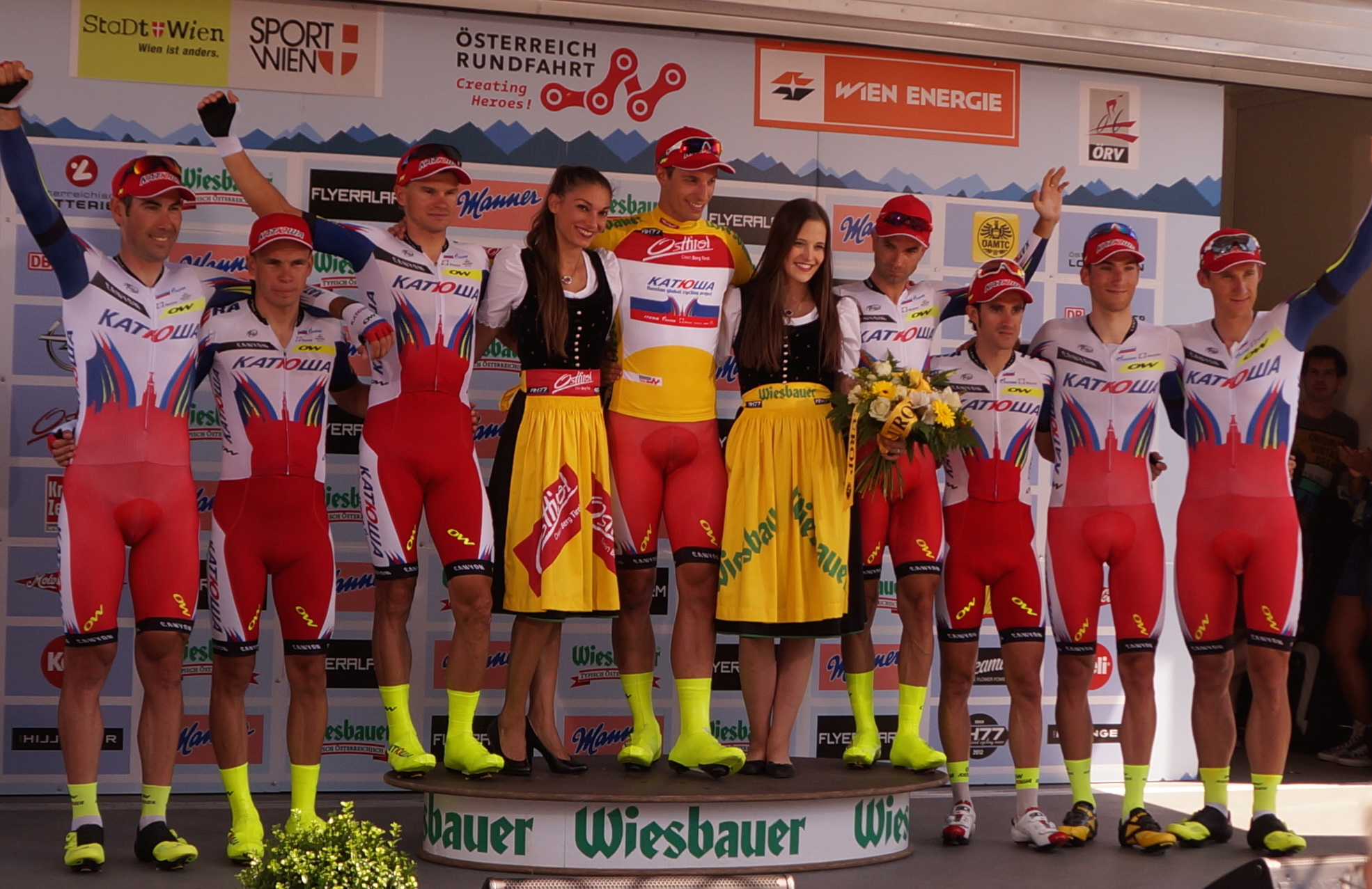 Siegerehrung Mannschaftszeitfahren 2015